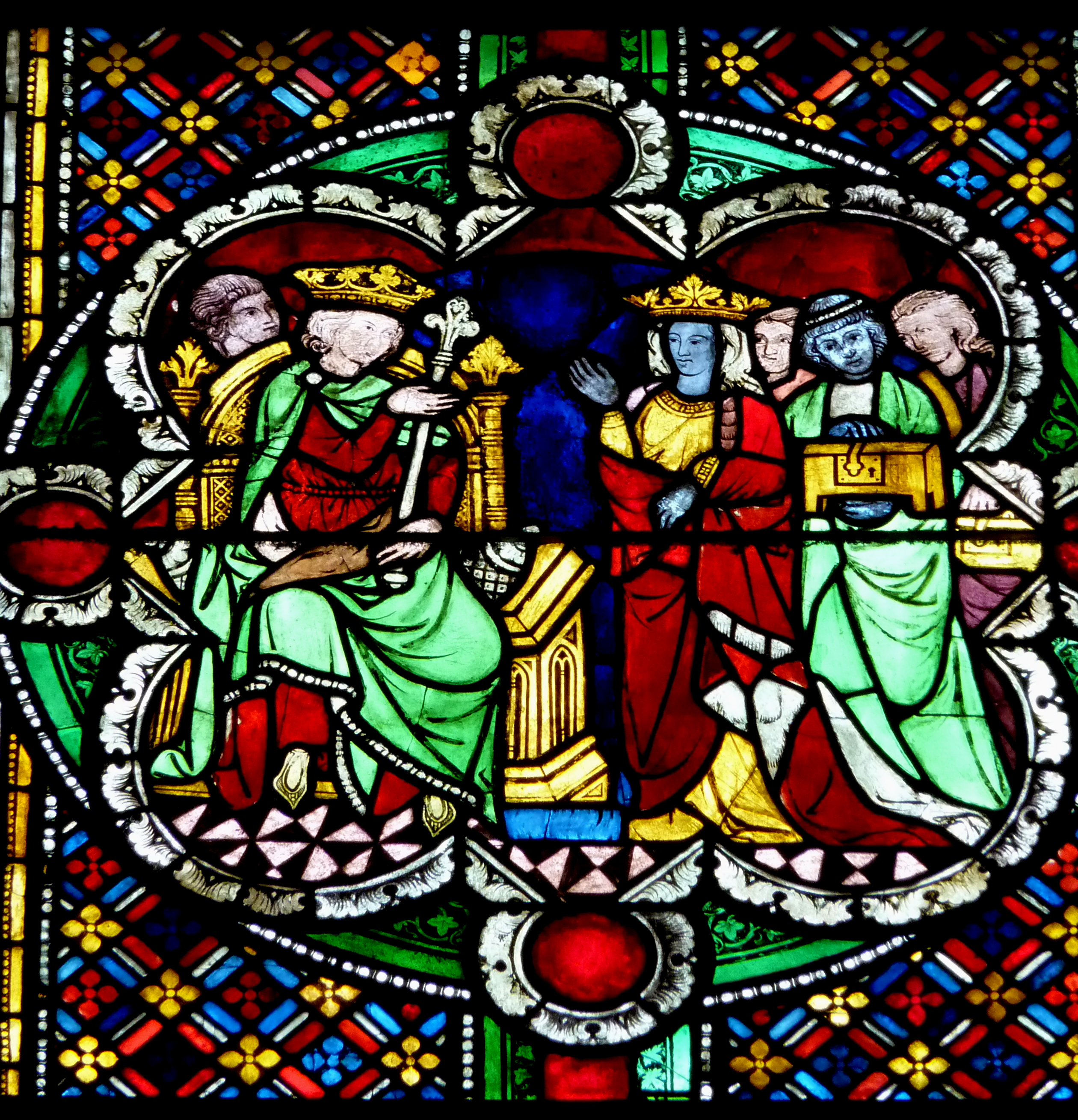 Scheibe aus dem "Jüngeren Bibelfenster" im Chor des Kölner Doms, Darstellung: Königin von Saba vor Salomo, Entstehung um 1280